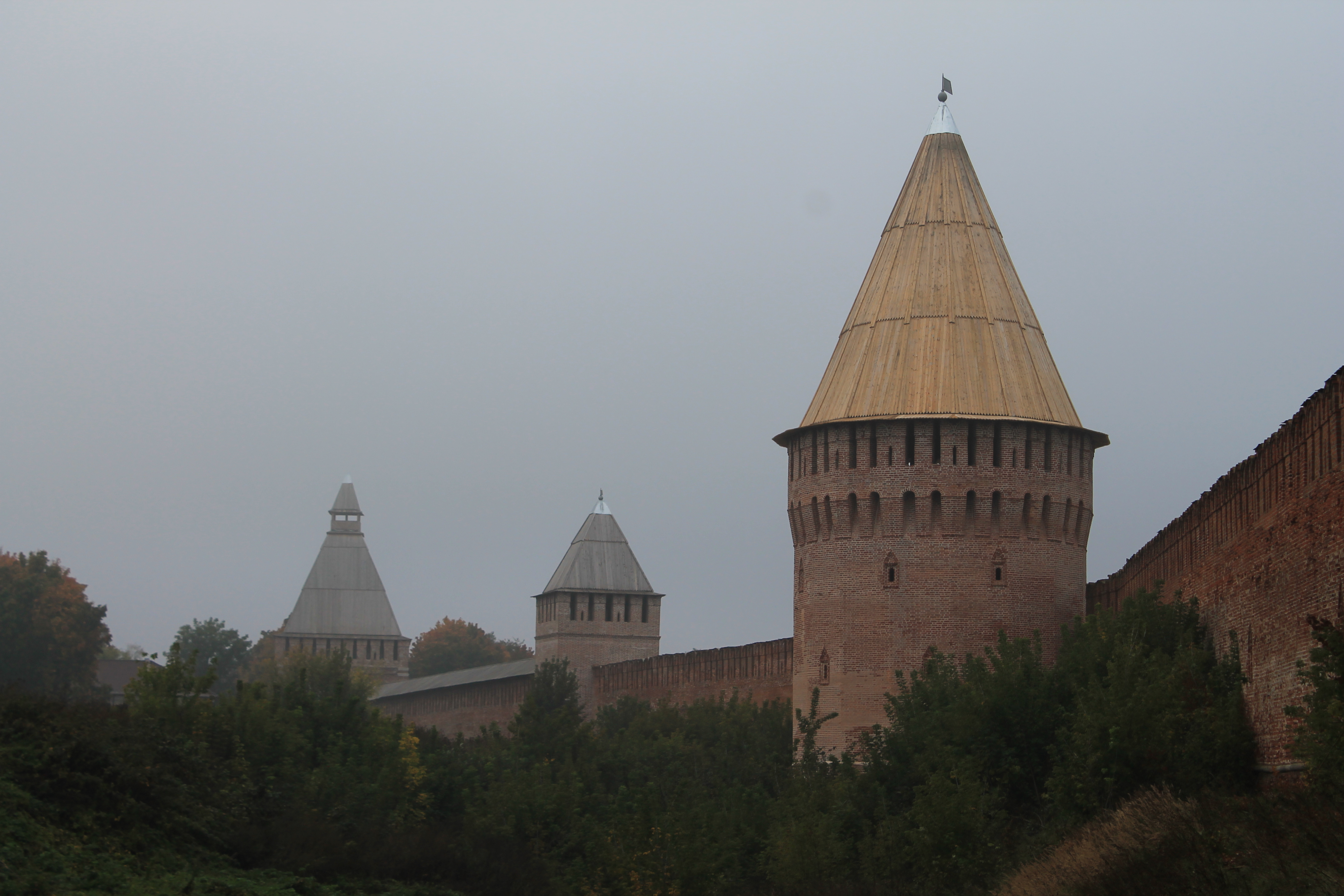 Крепостные стены и башни (Крепость Смоленская) (Смоленская область, Смоленск, сквер Памяти героев, Маршала Жукова улица, Октябрьской Революции улица, Соболева улица, Студенческая улица, Тимирязева улица, центральный парк культуры и отдыха)